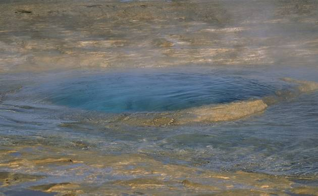 Ausbruch eines Geysirs (2/6) Forograf: Andreas Tille